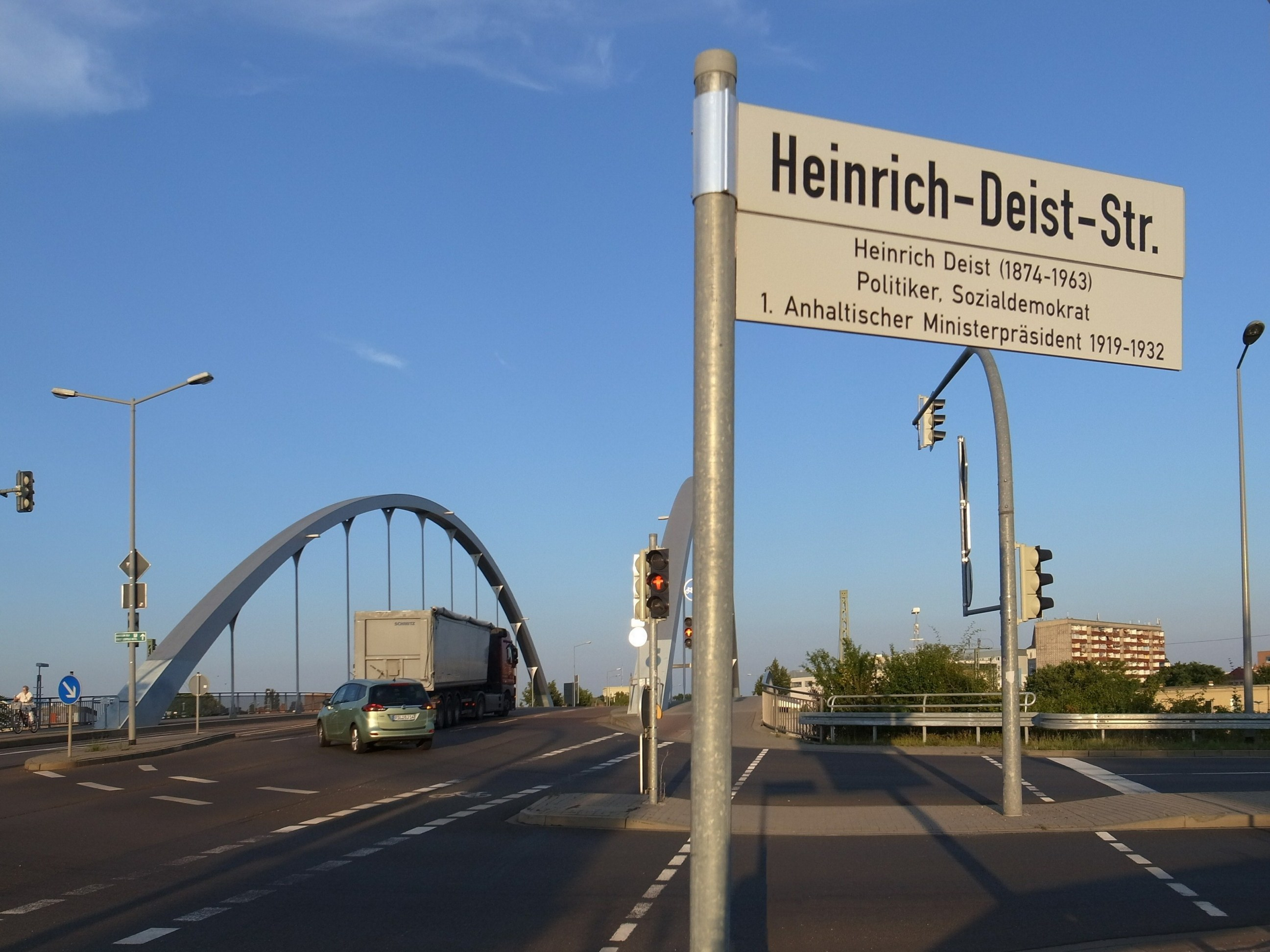 Dessau, Heinrich-Deist-Str., Bahnhofsbrücke